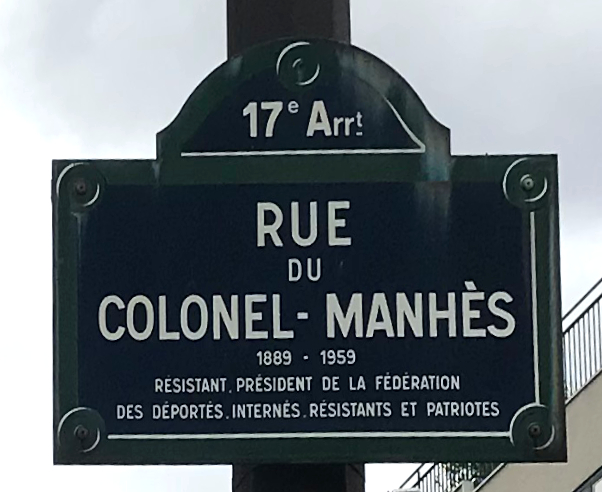 Image de Paris, septembre 2018.